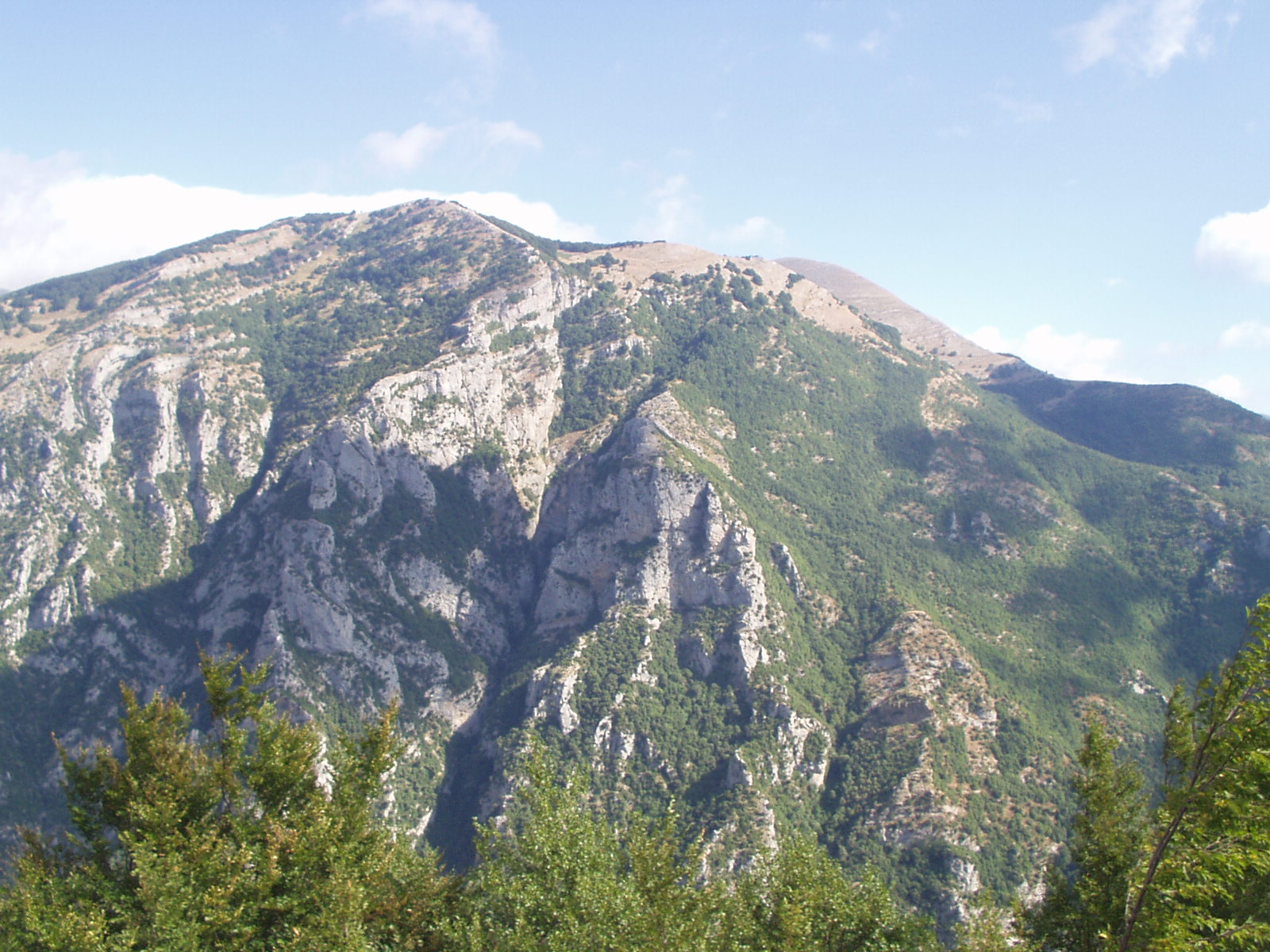 Monto La Mula, Montaro Pollino, Italio